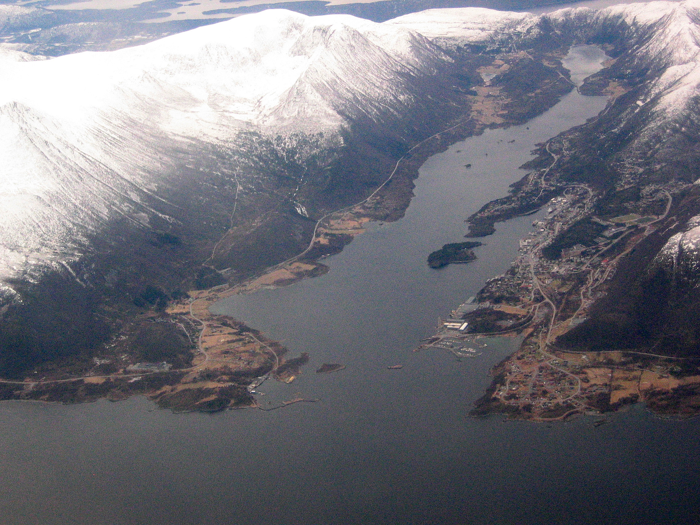 Brattvåg by Samfjorden Taken from airplane from Ålesund to Trondheim